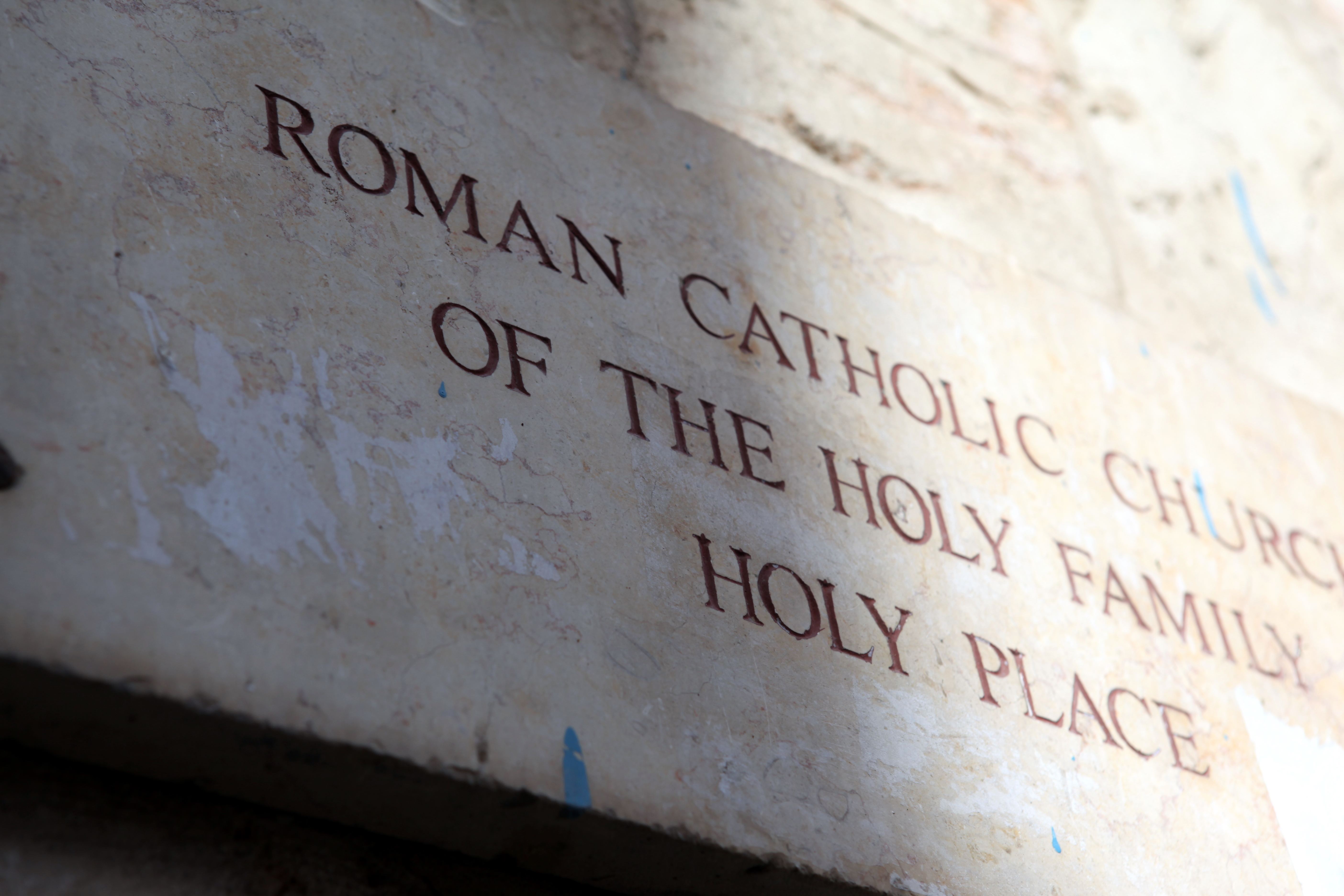 Austrian Hospice Jerusalem